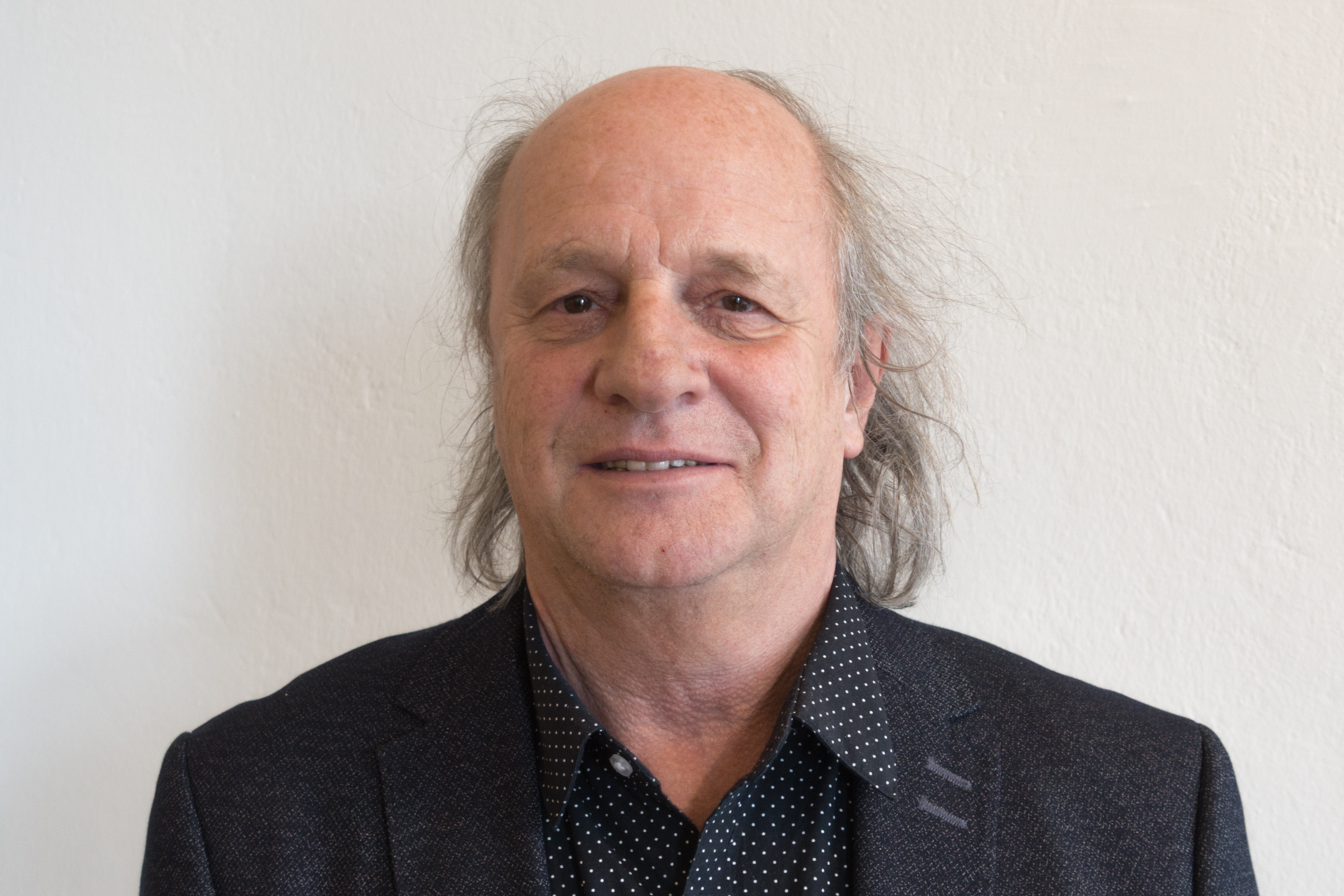 Leopold Kogler